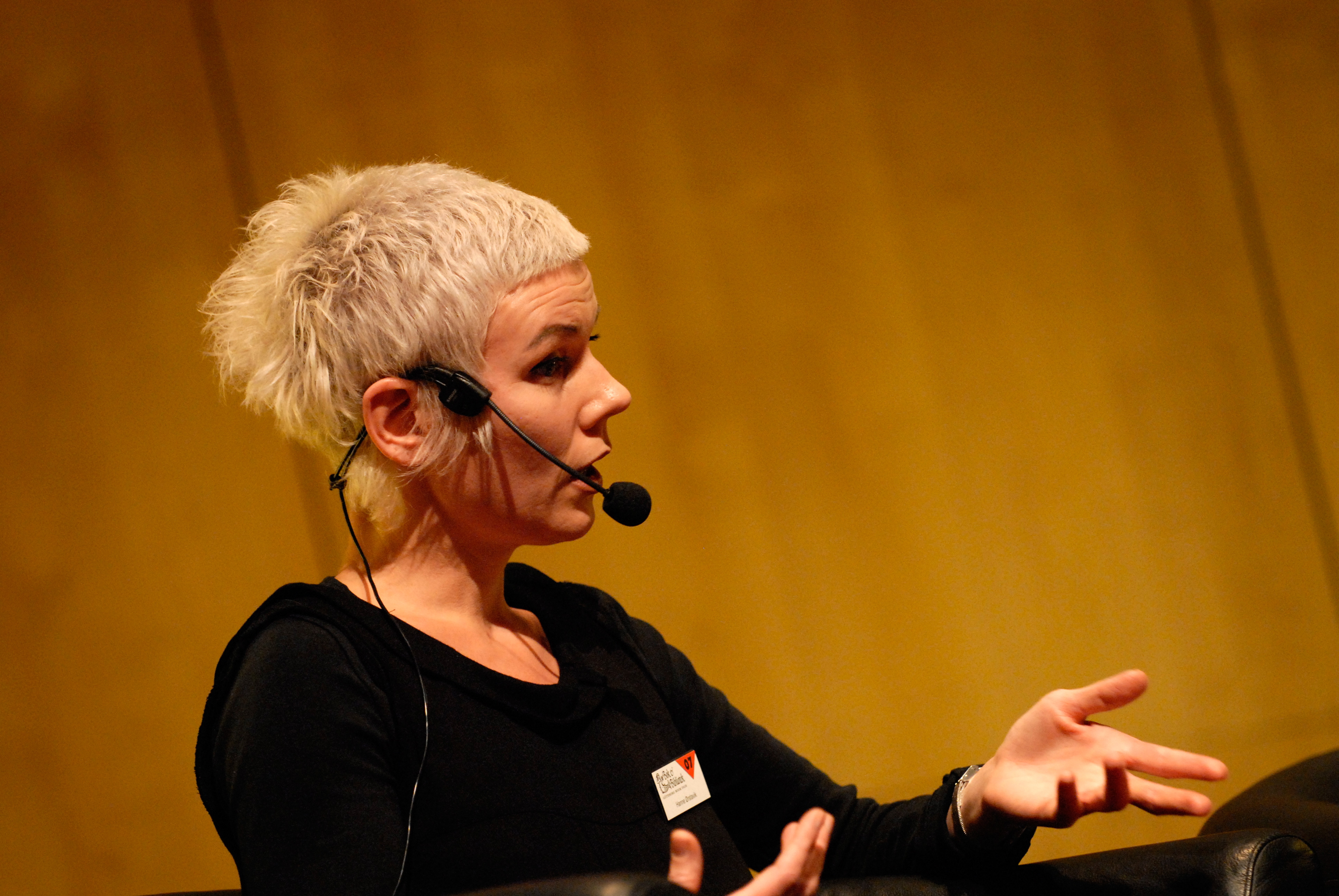 Hanne Ørstavik på seminariet författaren i boken, på bokmässan i Göteborg, 2007-09-29